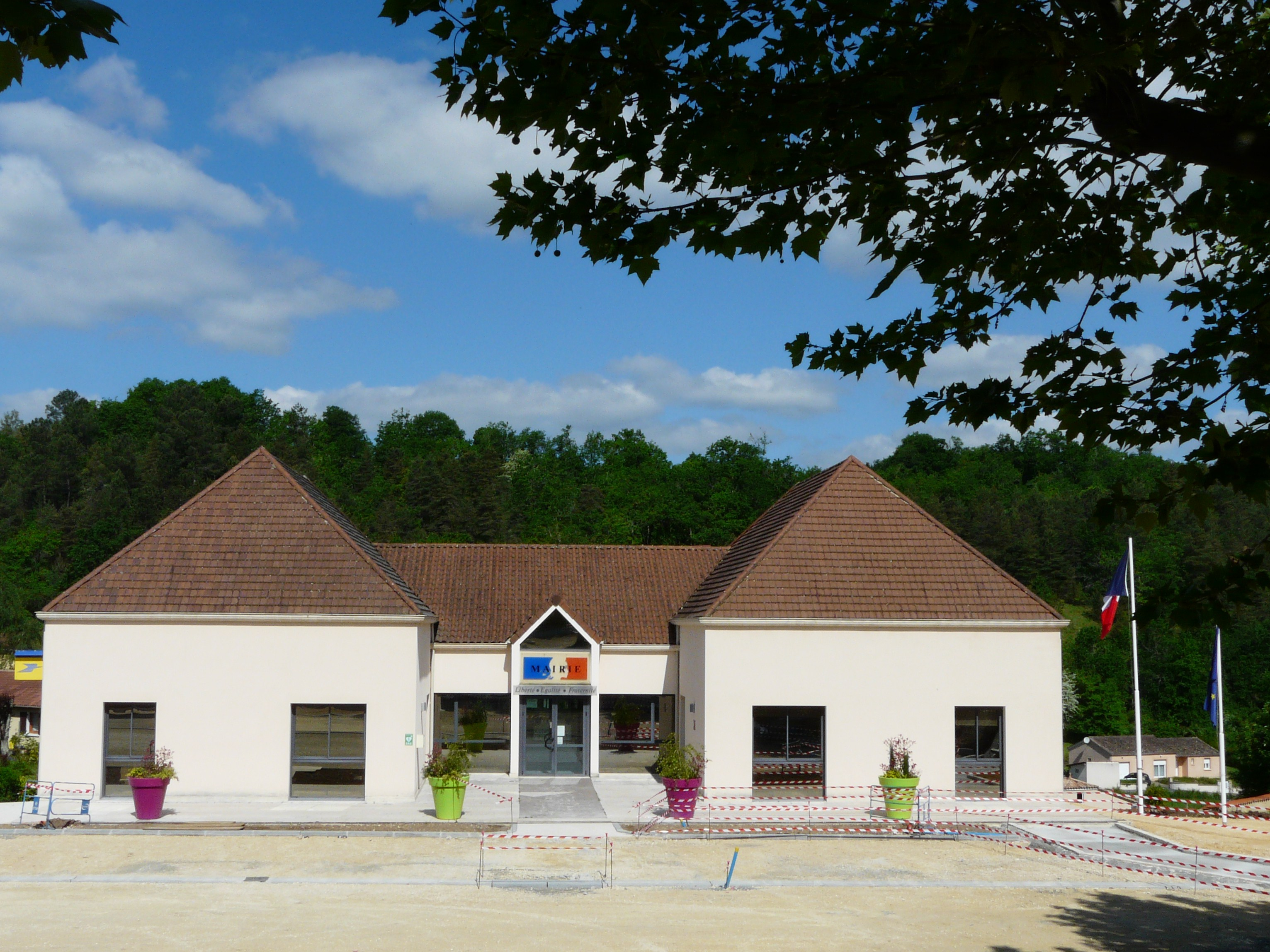 La mairie de Coursac, Dordogne, France.